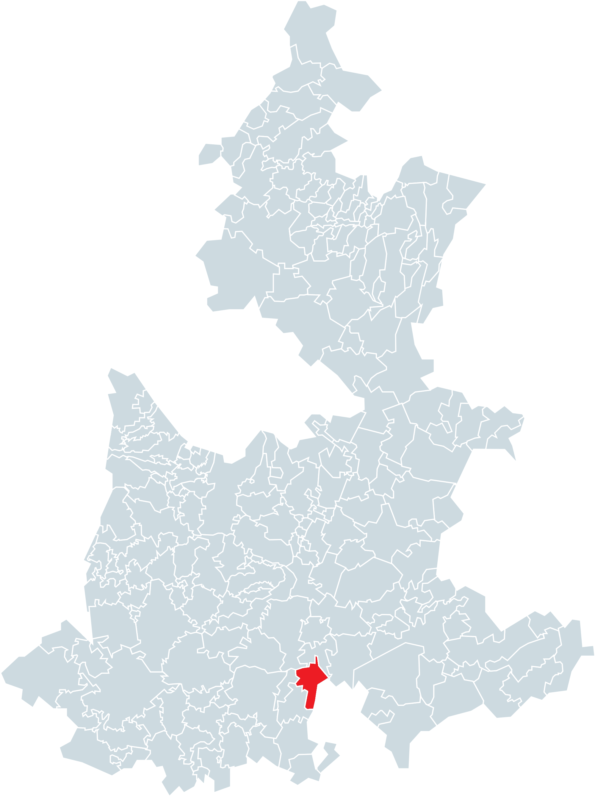 Municipio de Totoltepec de Guerrero